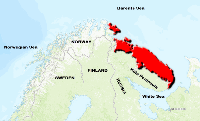 Mappa dell'ecoregione PA1106 - Tundra della penisola di Kola